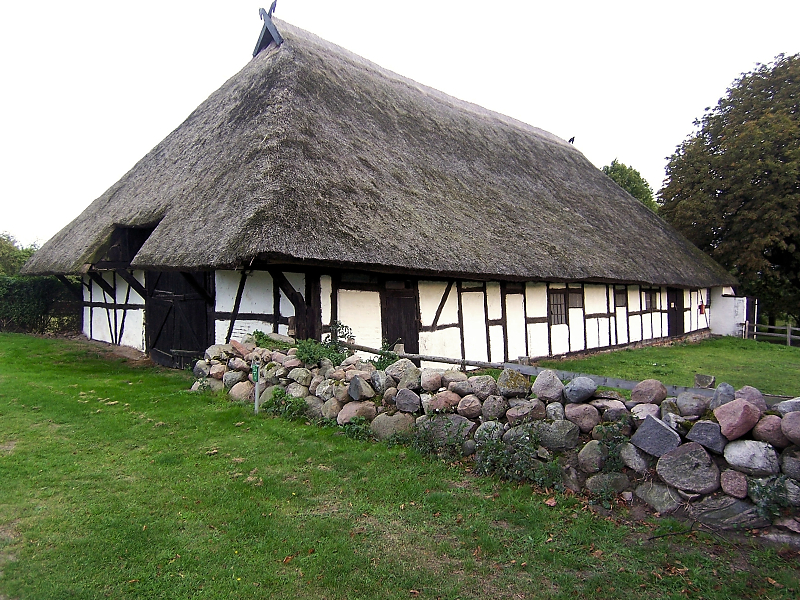 Scheune eine Dreiseitenhofes in diedrichshagen